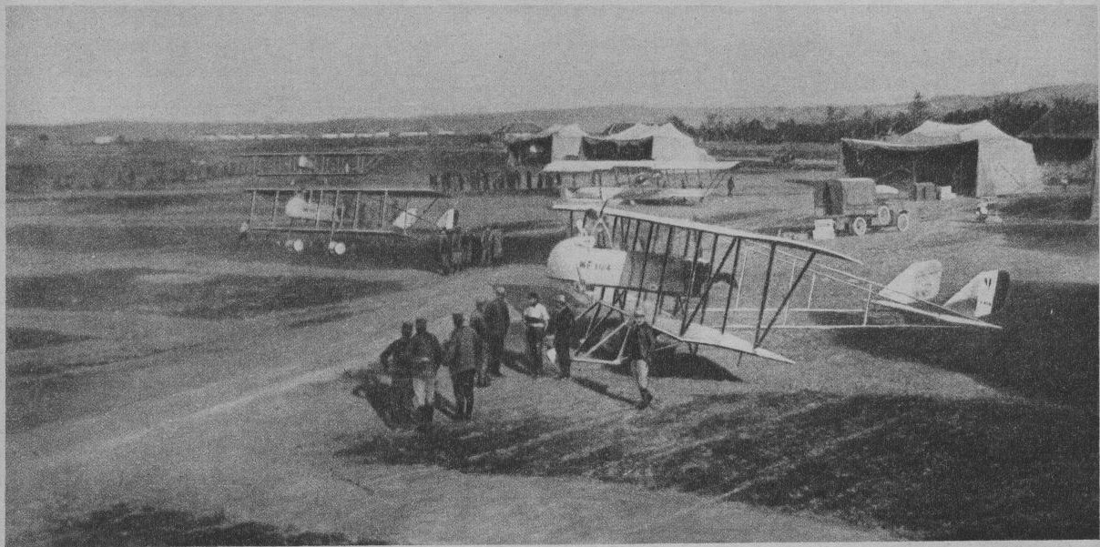 Les aviateurs français présent pour aider nos alliés Serbes à Nish.